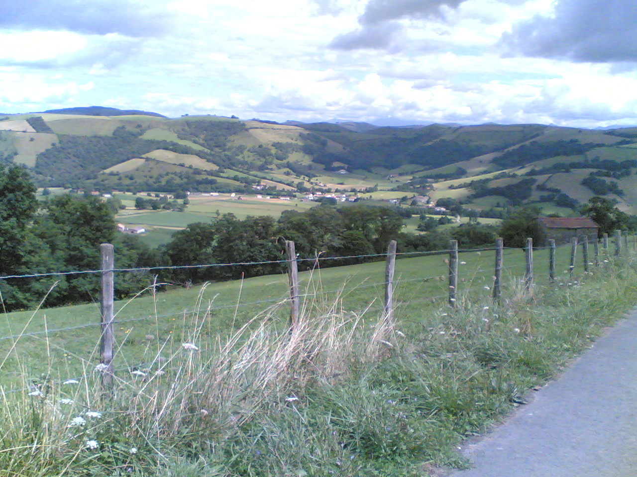 Pagolle depuis la route de Juxue